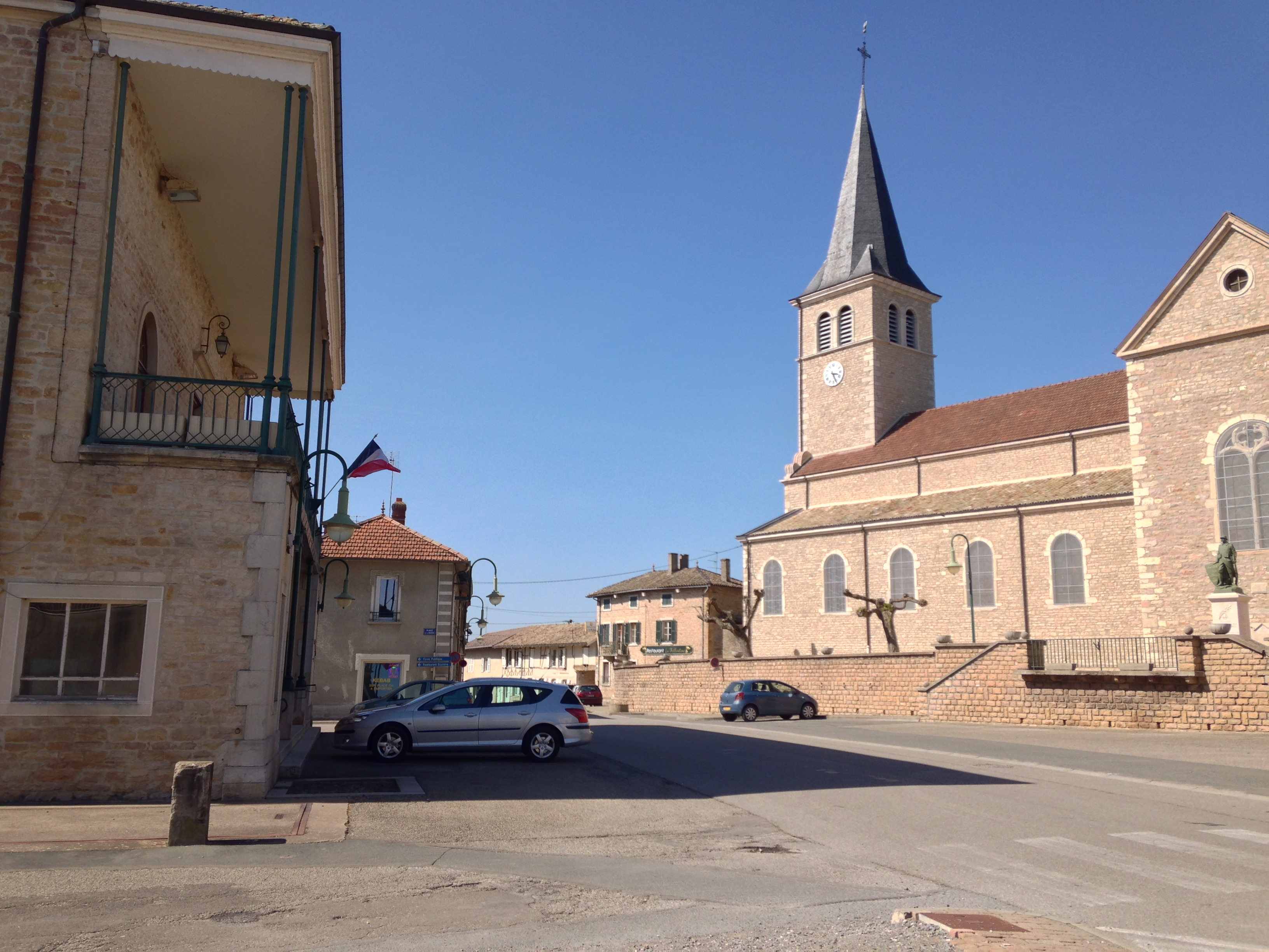 Place de Feillens avec la mairie et l'église